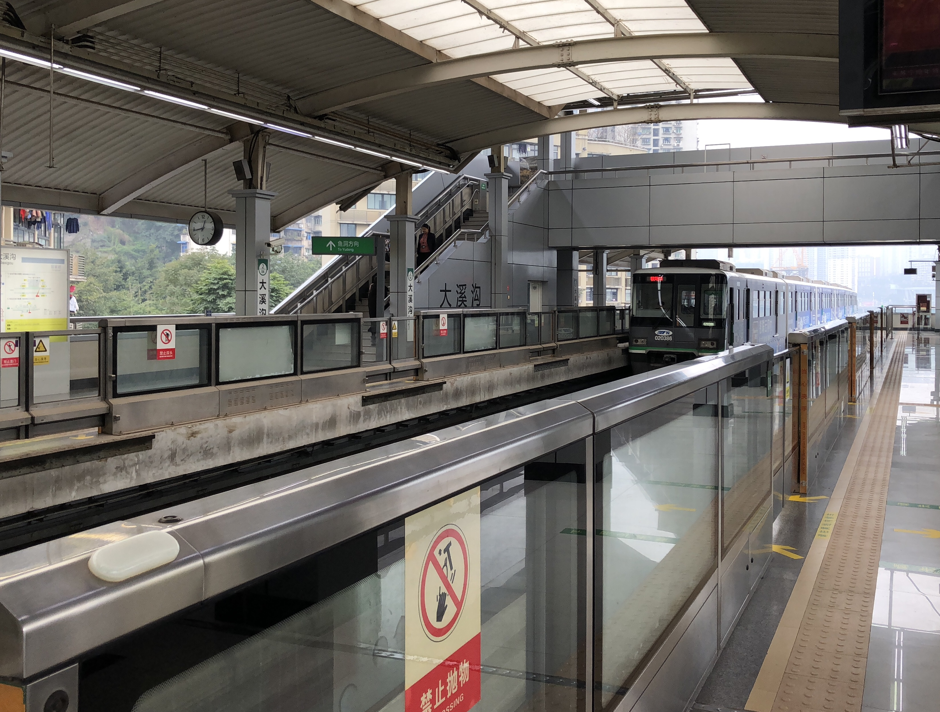 中文（中国大陆）: 大溪沟站站台